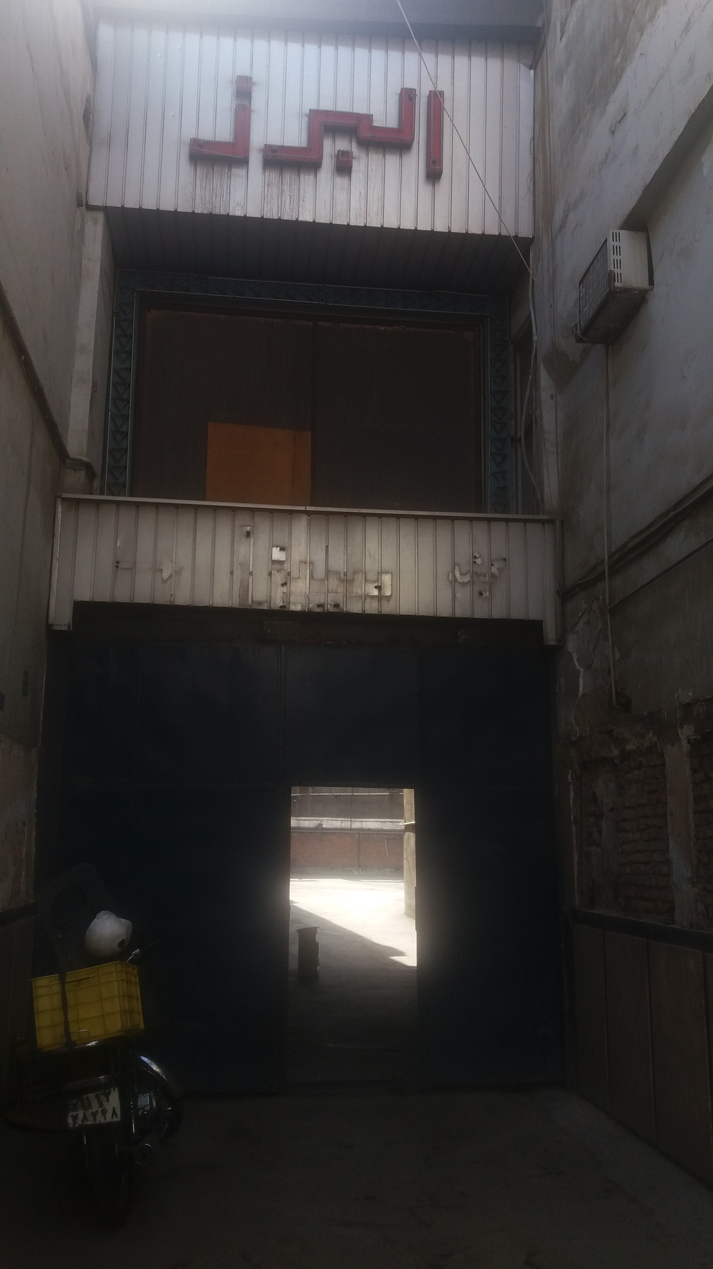 سینما البرز، خیابان لاله‌زار، تهران، ۱۳۹۵